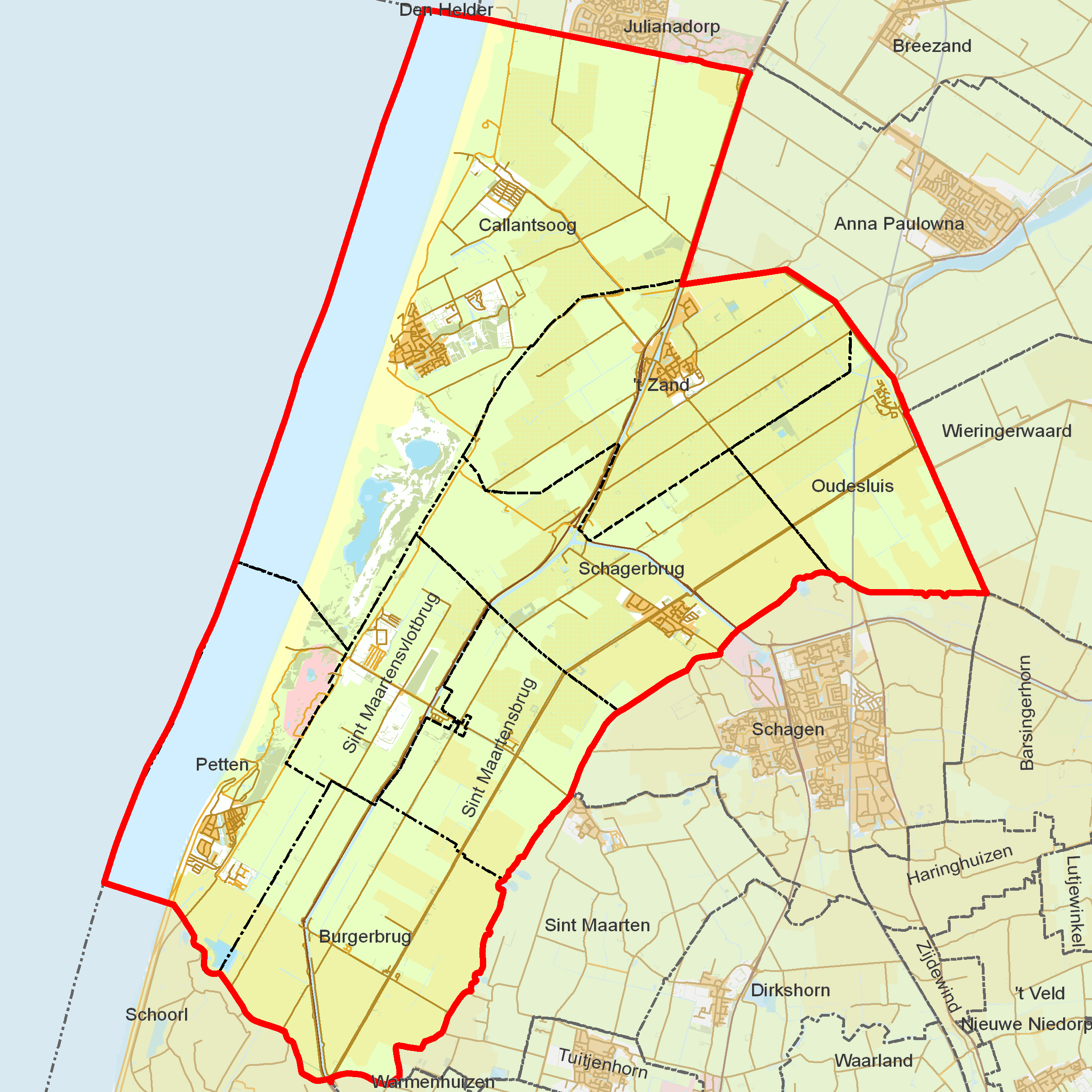 BAG woonplaatsen - Gemeente Zijpe.png